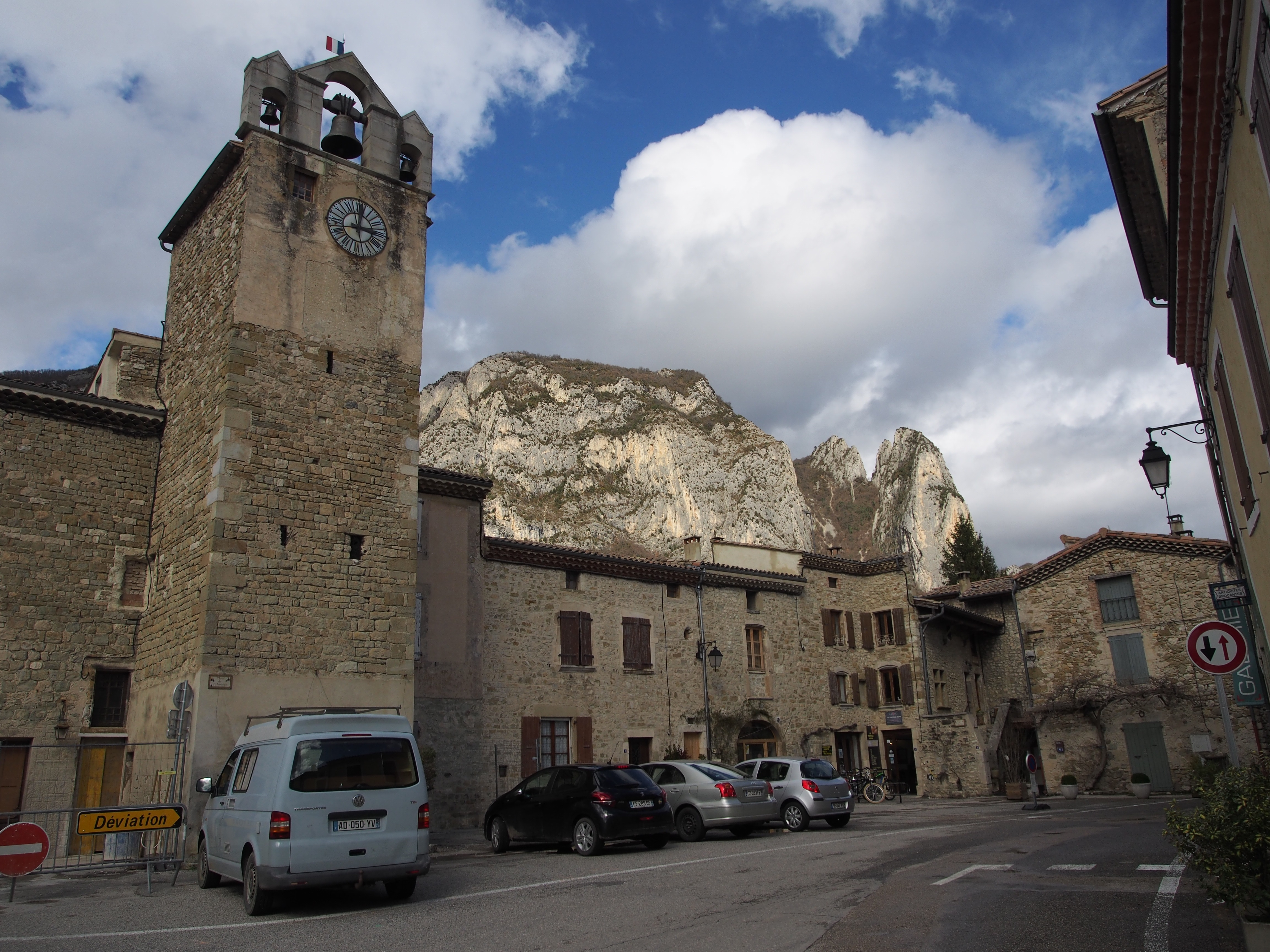 Saou rynek i wieża zegarowa.